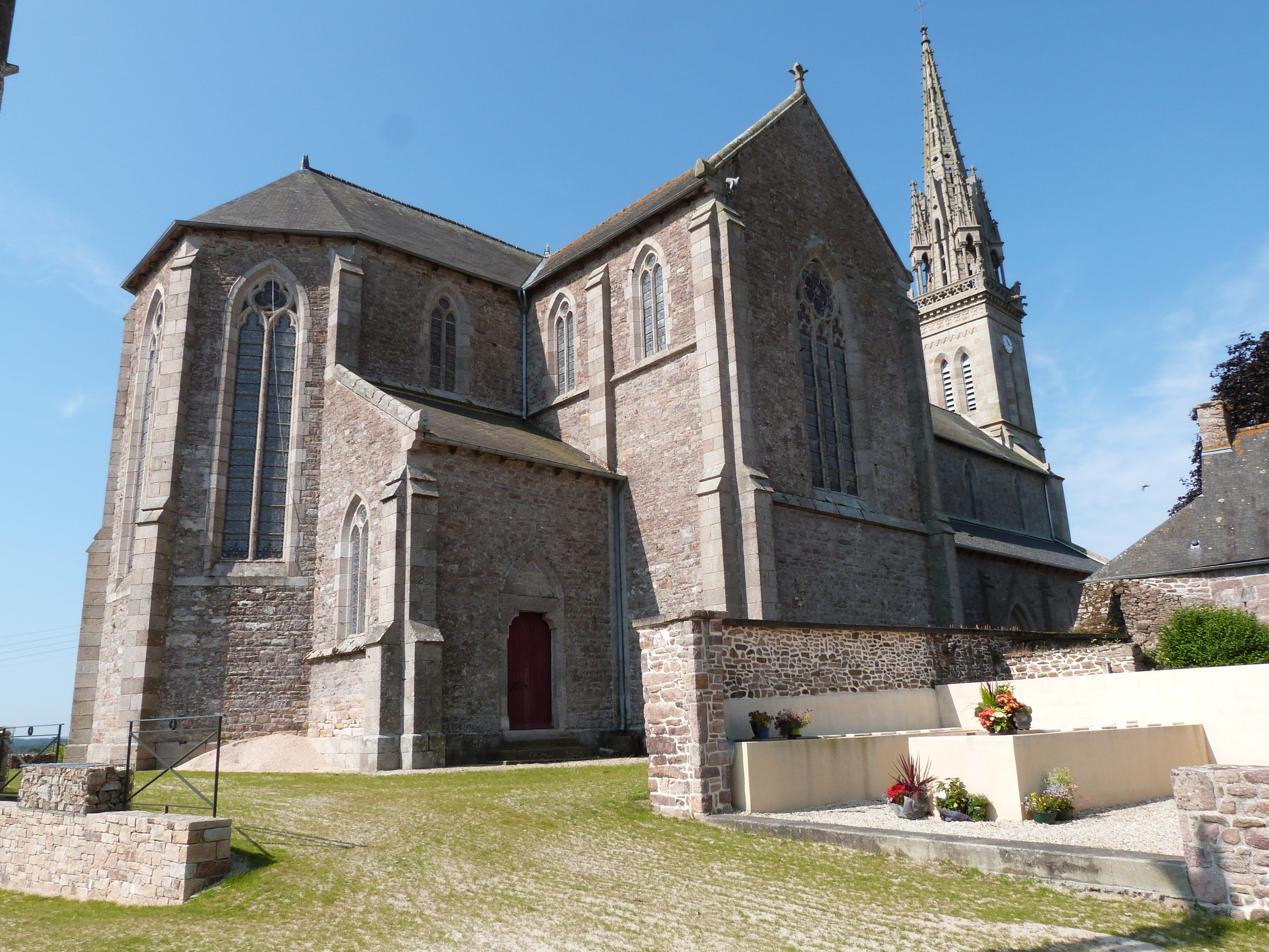 Vue de l'église Saint-Judoce depuis le monument aux morts situé dans l'enclos paroissial (Yvias, Côtes-d'Armor)